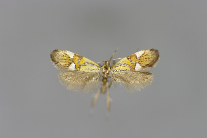 Alabonia geoffrella, Männchen